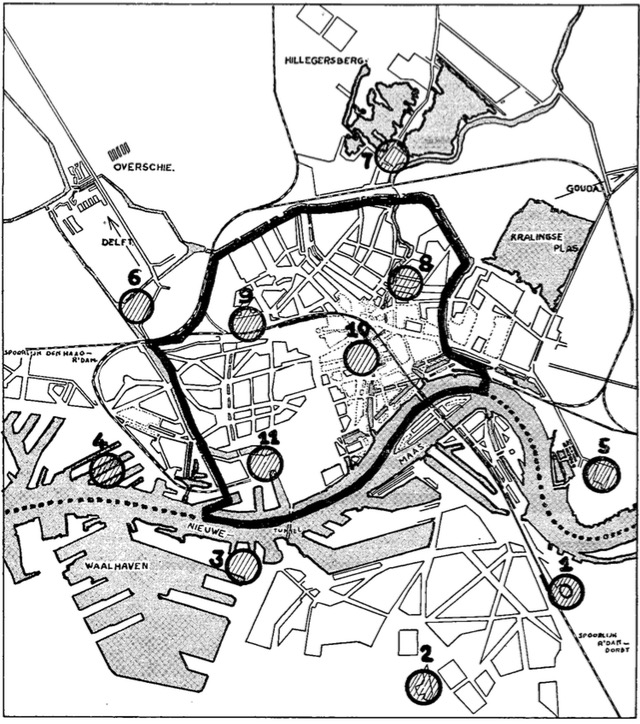 Op 10 november 1944 werd de razzia uitgevoerd in Schiedam en in de gedeelten van Rotterdam die buiten de zwarte lijn gelegen zijn. Op 11 november werd de razzia uitgevoerd in het stads­gedeelte binnen de zwarte lijn. Per wijk werden de mannen gebracht naar de met een cirkel aangegeven verzamelplaatsen, t.w.: het nieuwe Feyenoordstadion; het oude Feyenoordterrein; de autobusremise aan de Sluisjesdijk; havenloodsen; de marinierskazerne; de houthandel n.v. Abraham van Stolk en Zn.; de tramremise aan de Kootsekade en de uitspanning Lommerrijk; Heineken’s Brouwerij; het Nenijto-terrein; de Beurs; het Centrale Belastinggebouw.